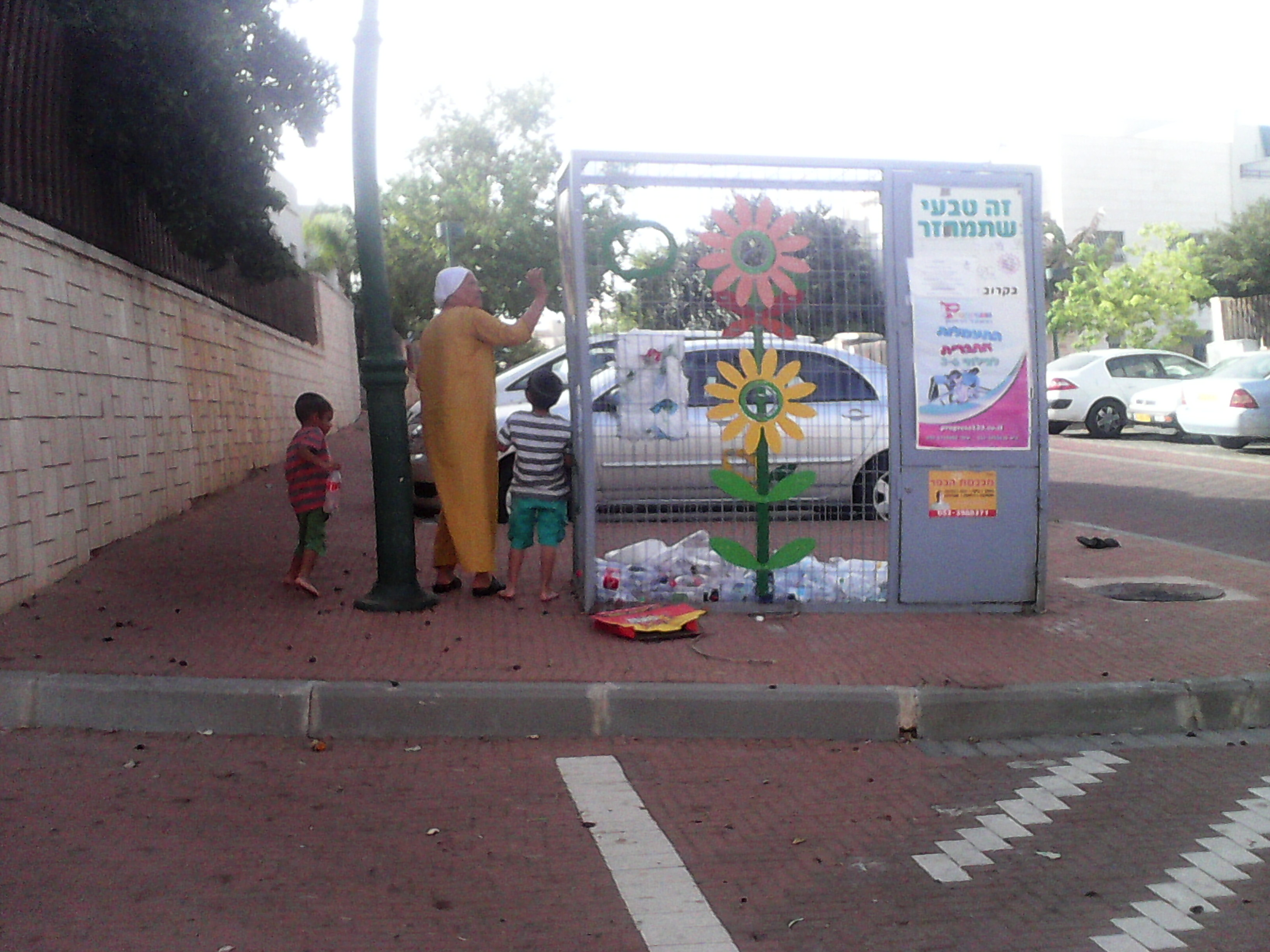 השלכת בקבוקי פלסטיק למיחזורית (כפר יונה)